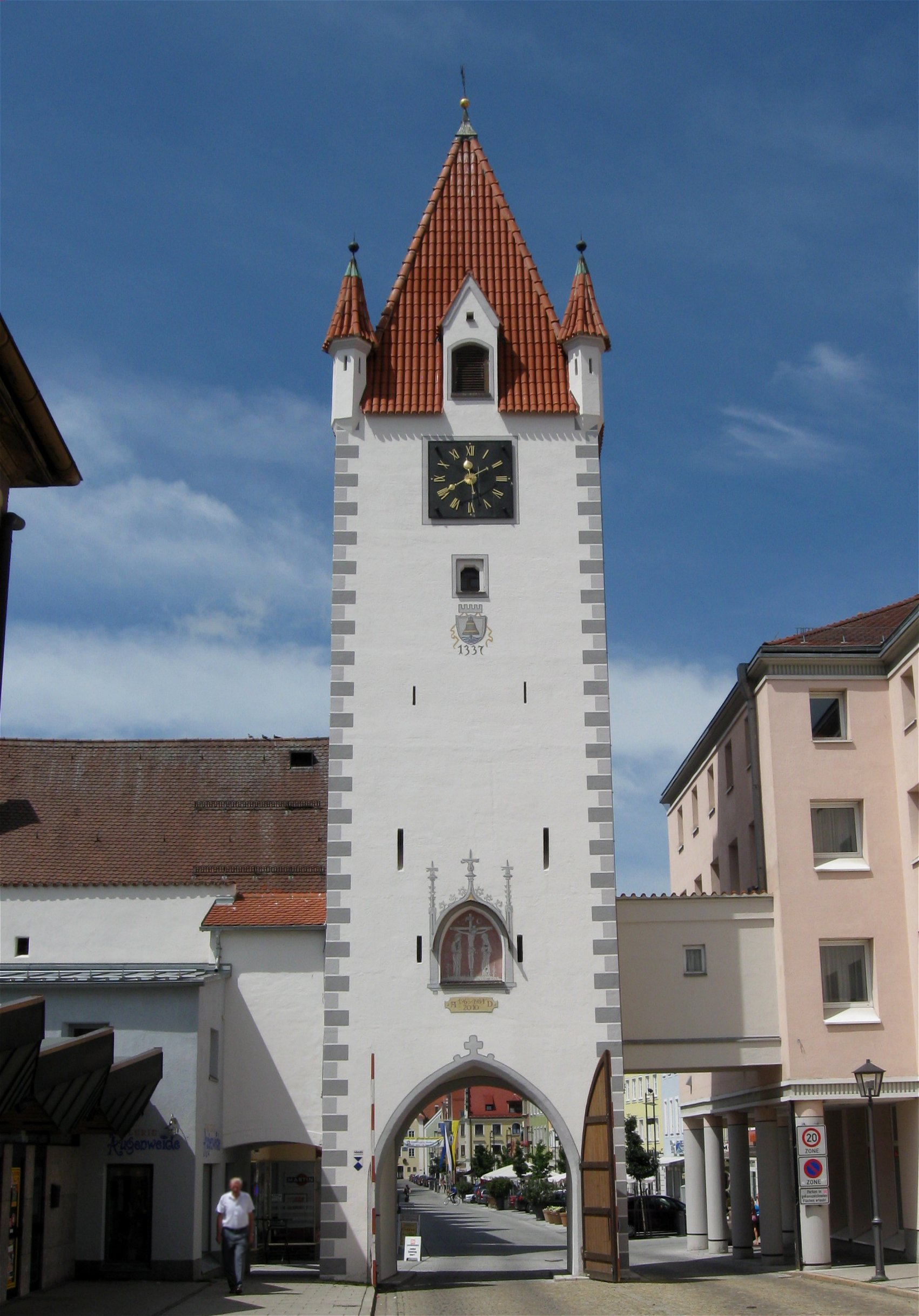 Imhofgasse 1; Oberes Tor, fünfgeschossiger, quadratischer Torturm mit tonnengewölbter Durchfahrt und Zeltdach mit Zwerchhäusern und oktogonalen Erkertürmchen, um 1500; siehe Stadtbefestigung. D-7-78-173-76